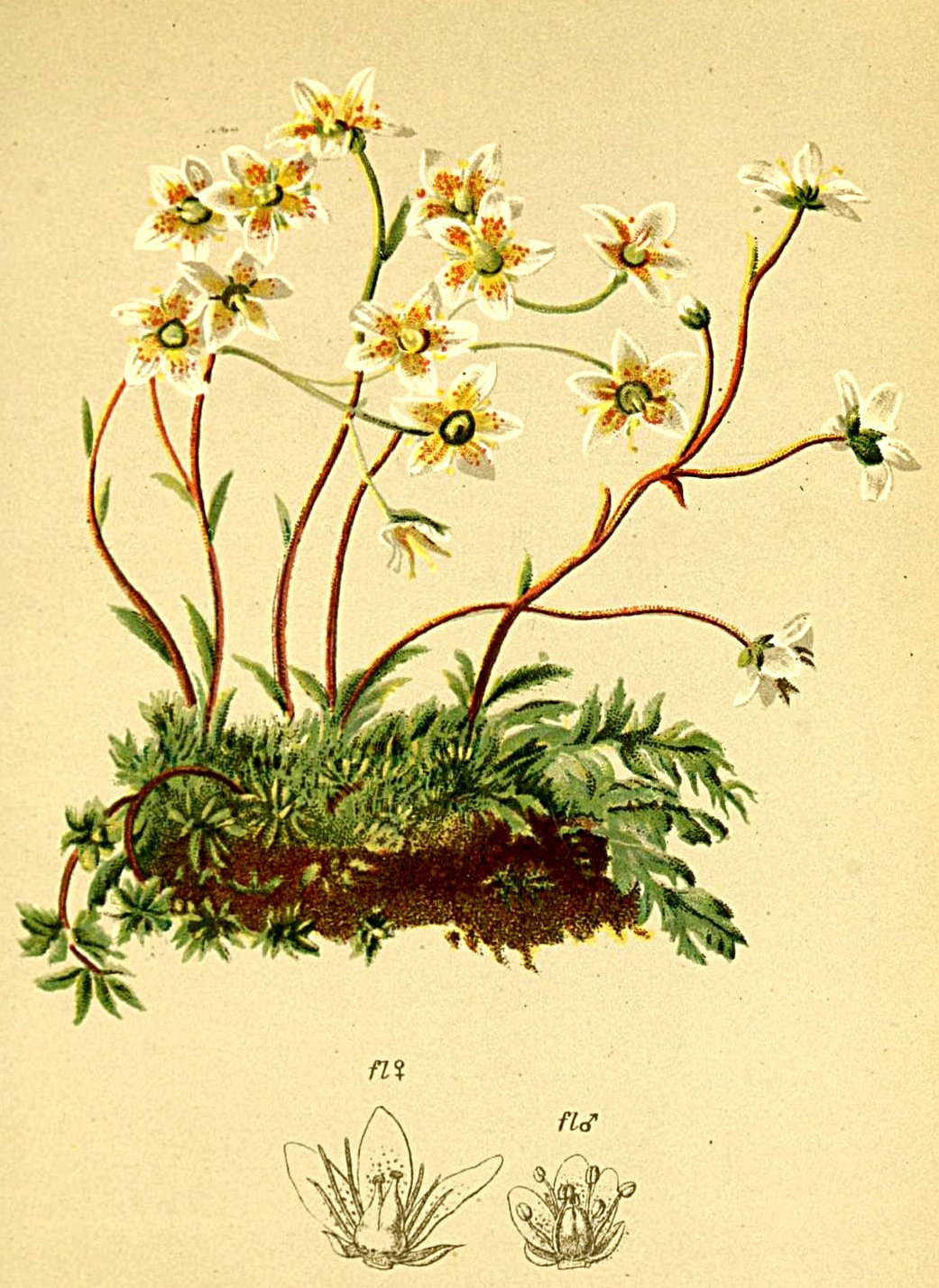 Saxifraga aspera